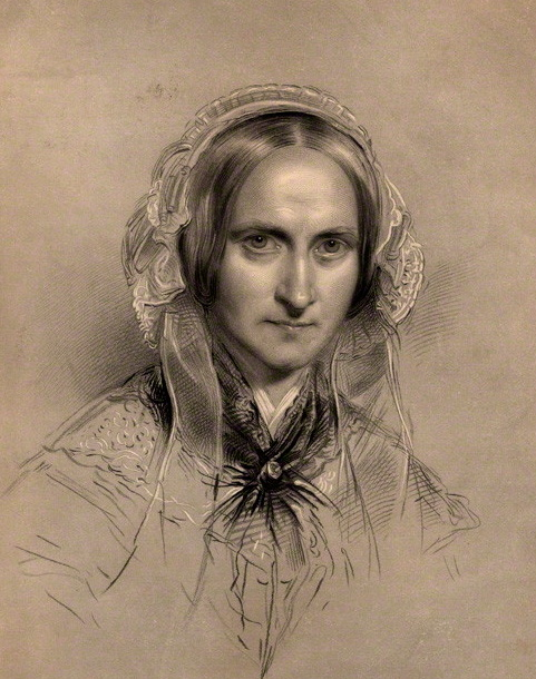 Ritratto della Regina Adelaide Amelia Louisa Teresa Carolina di Sassonia-Coburgo Meiningen, consorte di Guglielmo IV